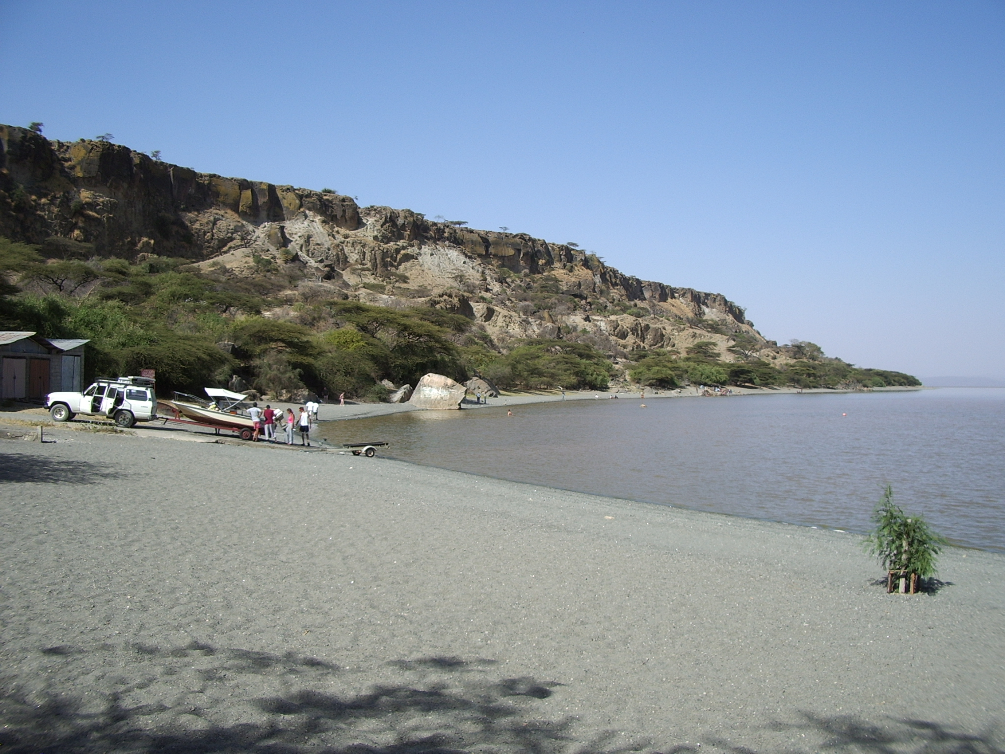 Ethiopia - Lake Langano